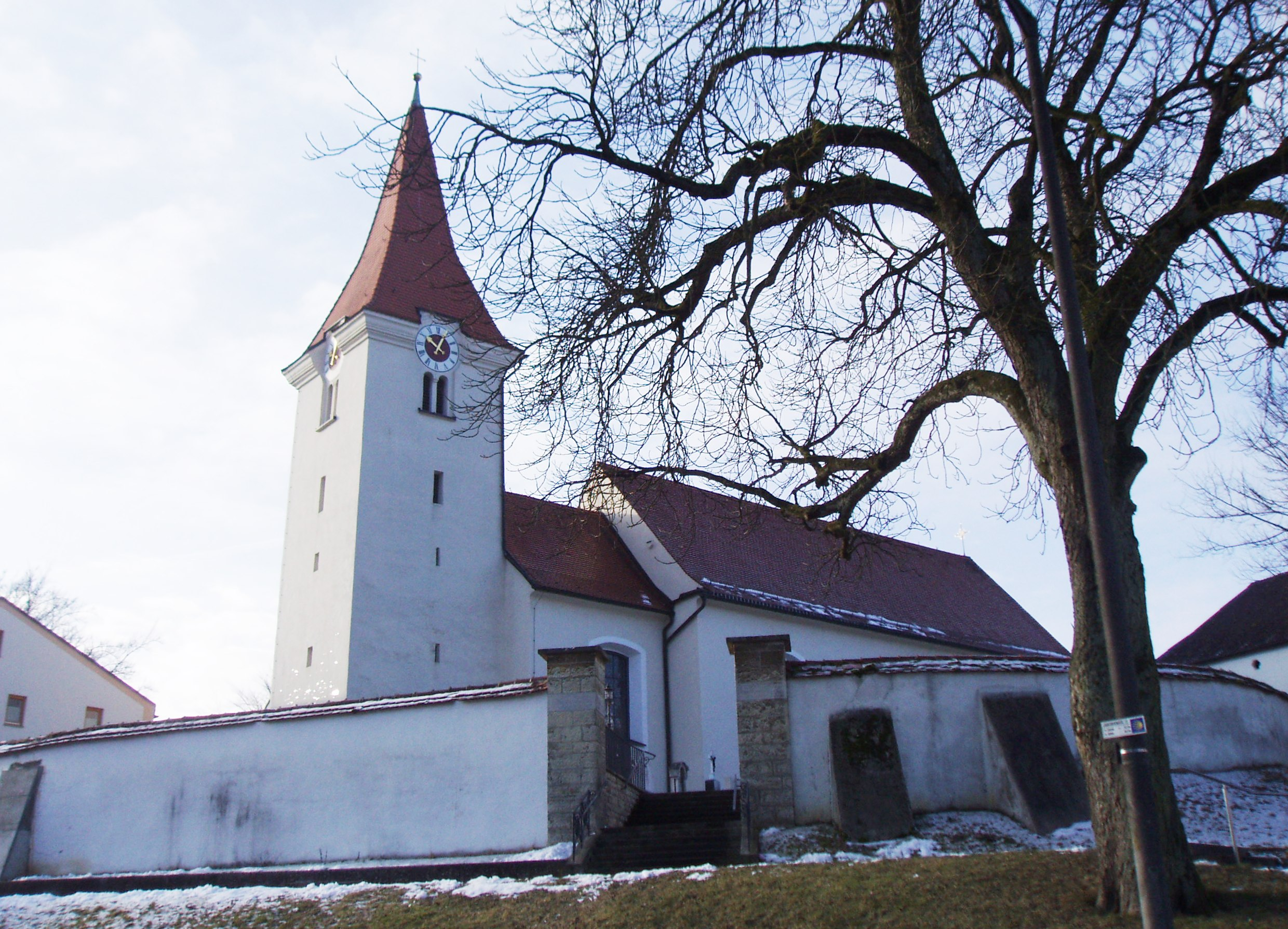 Böhmfeld im Landkreis Eichstätt, Kath. Pfarrkirche